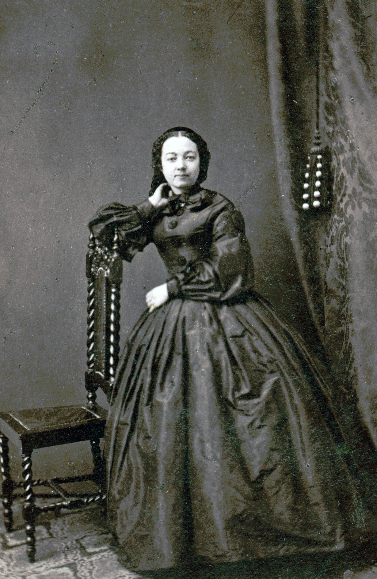 Helfrid Kinmansson, skådespelare vid Mindre teatern 1861